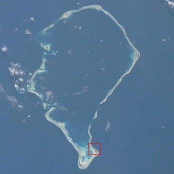 Ligging van Funafala in Funafuti (Tuvalu). Eigen werk op afbeelding die in orde is. Vrij.